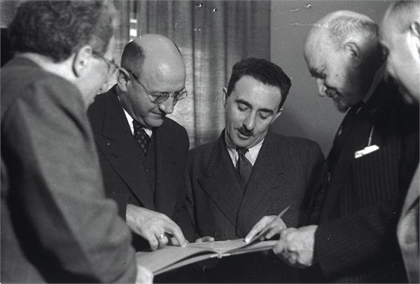 ירושלים - ביום הולדתו ה-70 של הד"ר ויצמן - חברי הנהלת הסוה"י בלוית הנשיא מקבלים פני משלחת המוסדות